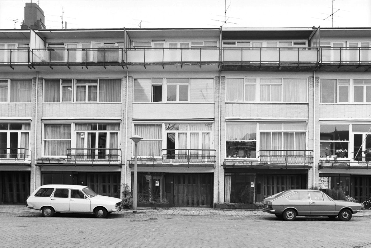 Drive-in woningen, Anthonie van Dijckstraat 4-12 (bouwjaar 1936), Architecten: M. Stam & L. Beese.